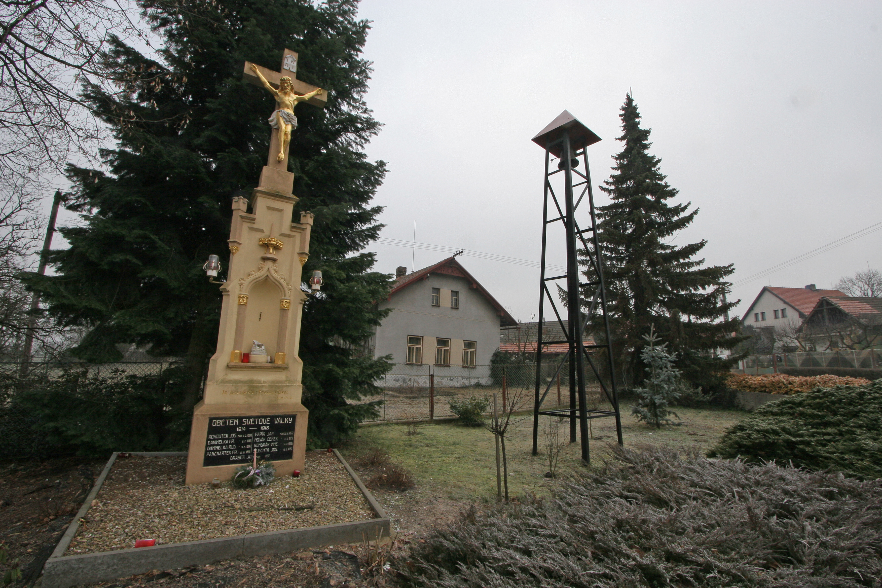 Vyšehněvice křížek a zvonička